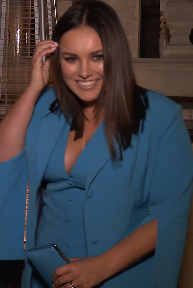 Polska piosenkarka Ewa Farna podczas konferencji ramówkowej telewizji Polsat w Warszawie, 28 sierpnia 2018